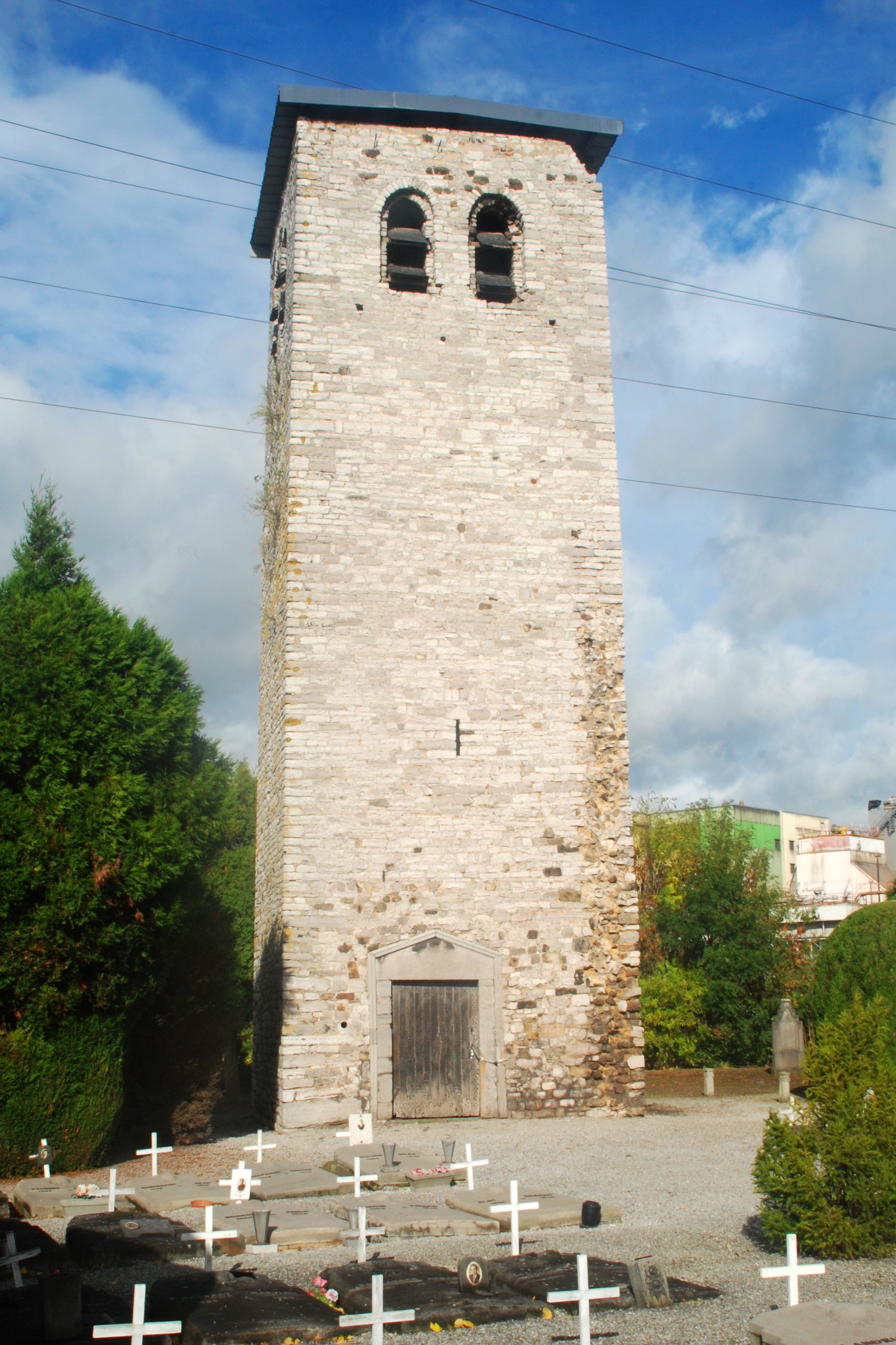 Belgique - Hainaut - Aiseau-Presles - Pont-de-Loup - Tour romane